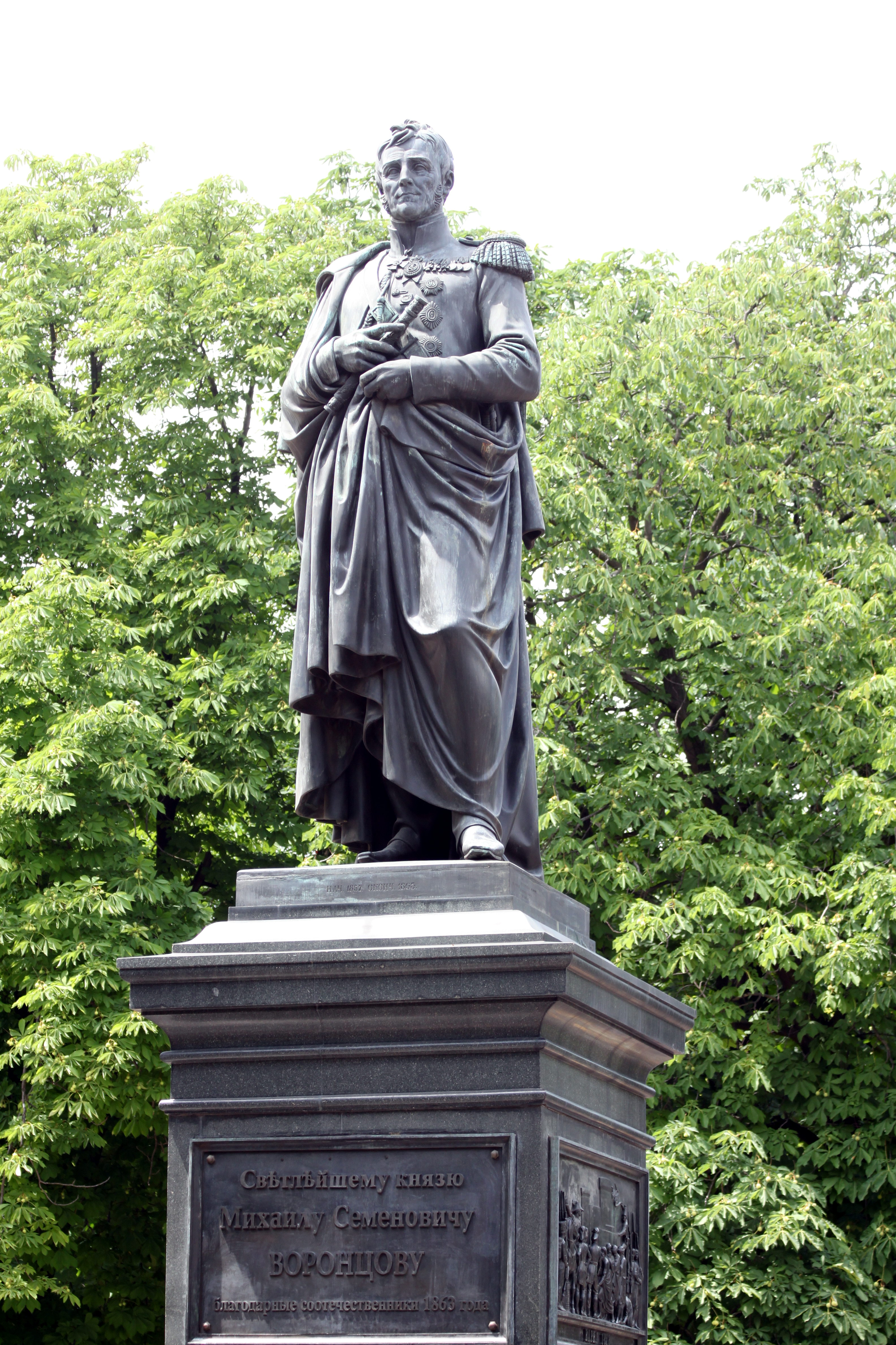 Пам'ятник М.С. Воронцову – князю, генерал-губернатору Новоросійського краю, герою Вітчизняної війни 1812 р., Одеса, Соборна пл.